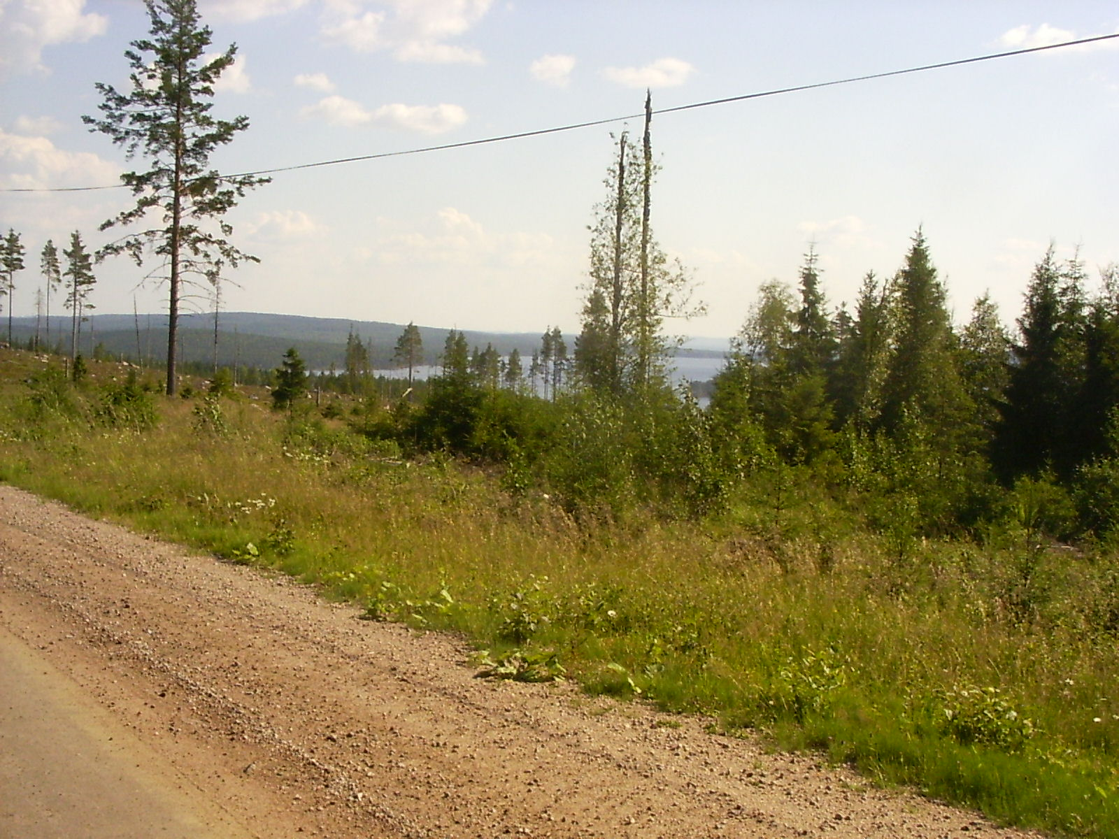 Het meer Naren vanaf de weg Geijersholm-Tyngsjö